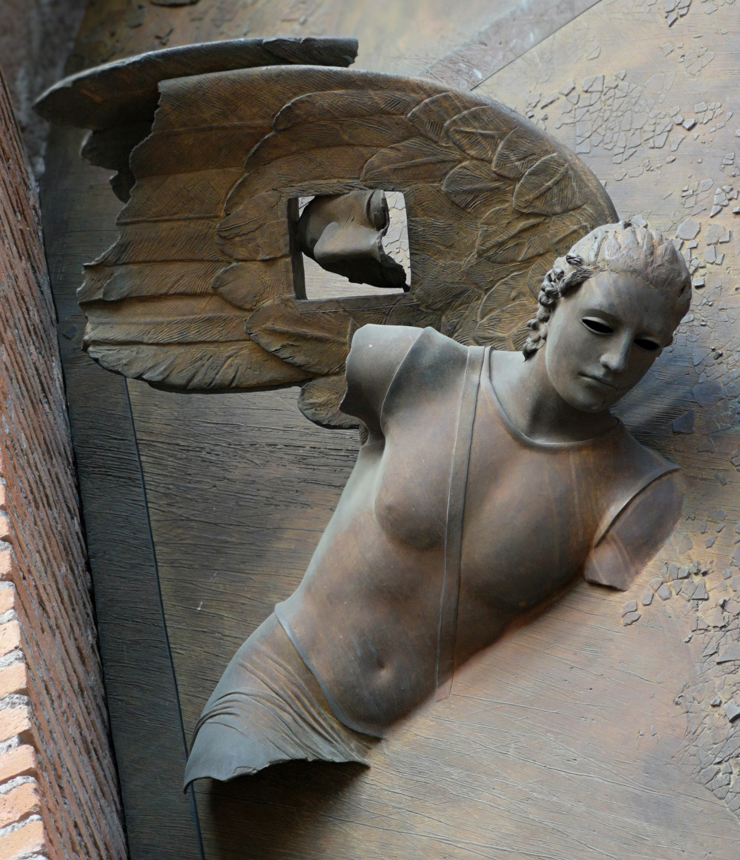 Rzeźba Igora Mitoraja w Bazylice Matki Bośej Anielskiej i Męczenników